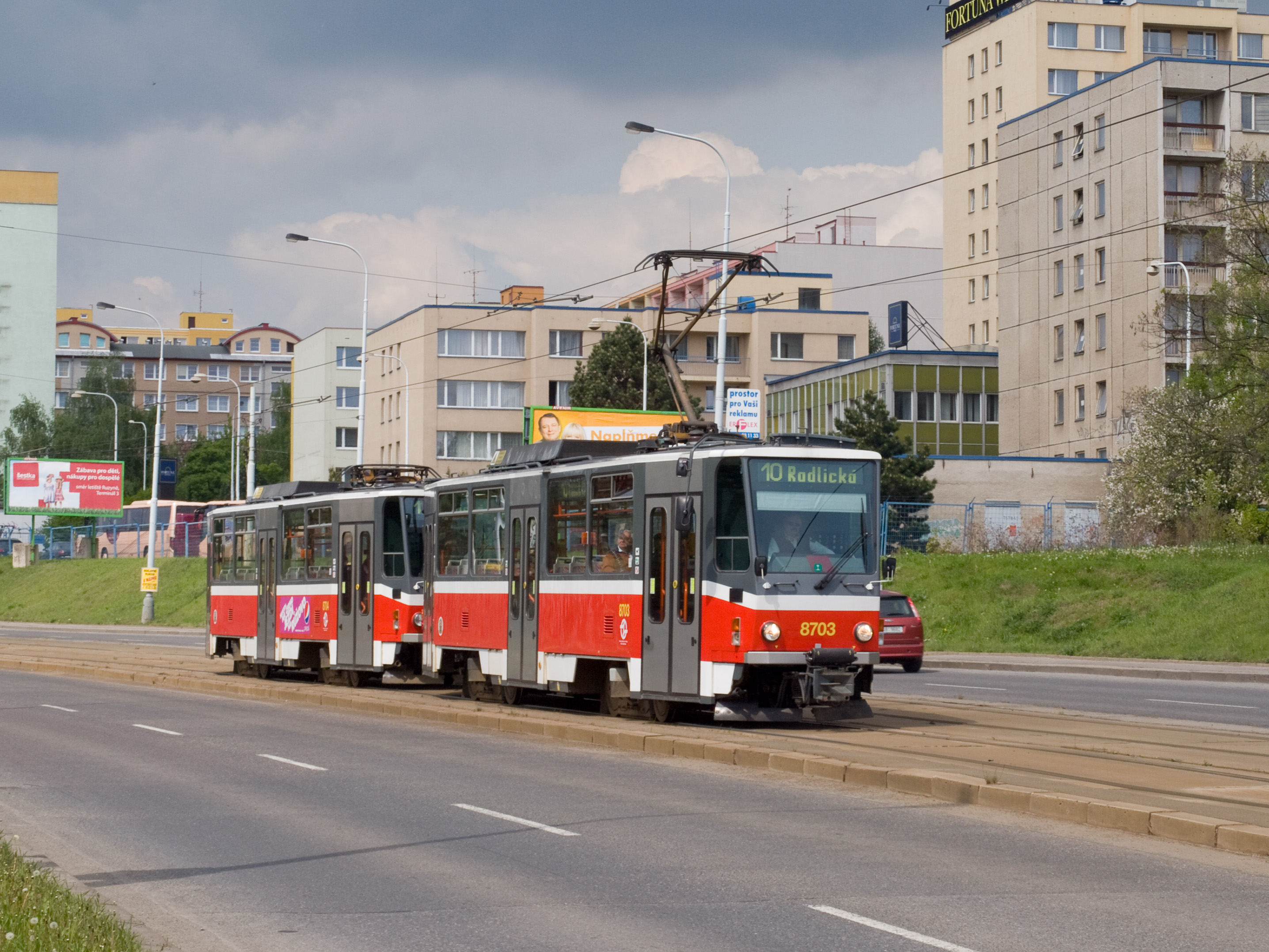 Typ vozu/type: Tatra T6A5 Evidenční číslo/registration number: 8703 Linka/line: 10 Zastávka(y)/stop(s): Krematorium Motol – Hlušičkova Trať/track: Motol – Sídliště Řepy Změny v linkovém vedení způsobeny Pražským mezinárodním maratonem 2010